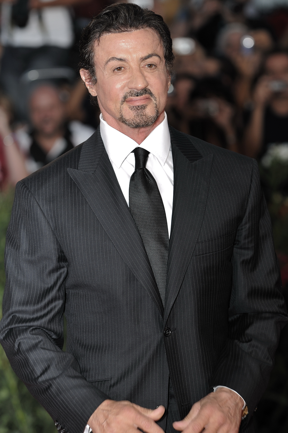 66ème Festival du Cinéma de Venise (Mostra), 11ème jour (12/09/2009) Tapis rouge pour la soirée de cloture du Festival de Venise 2009 Sylvester Stallone